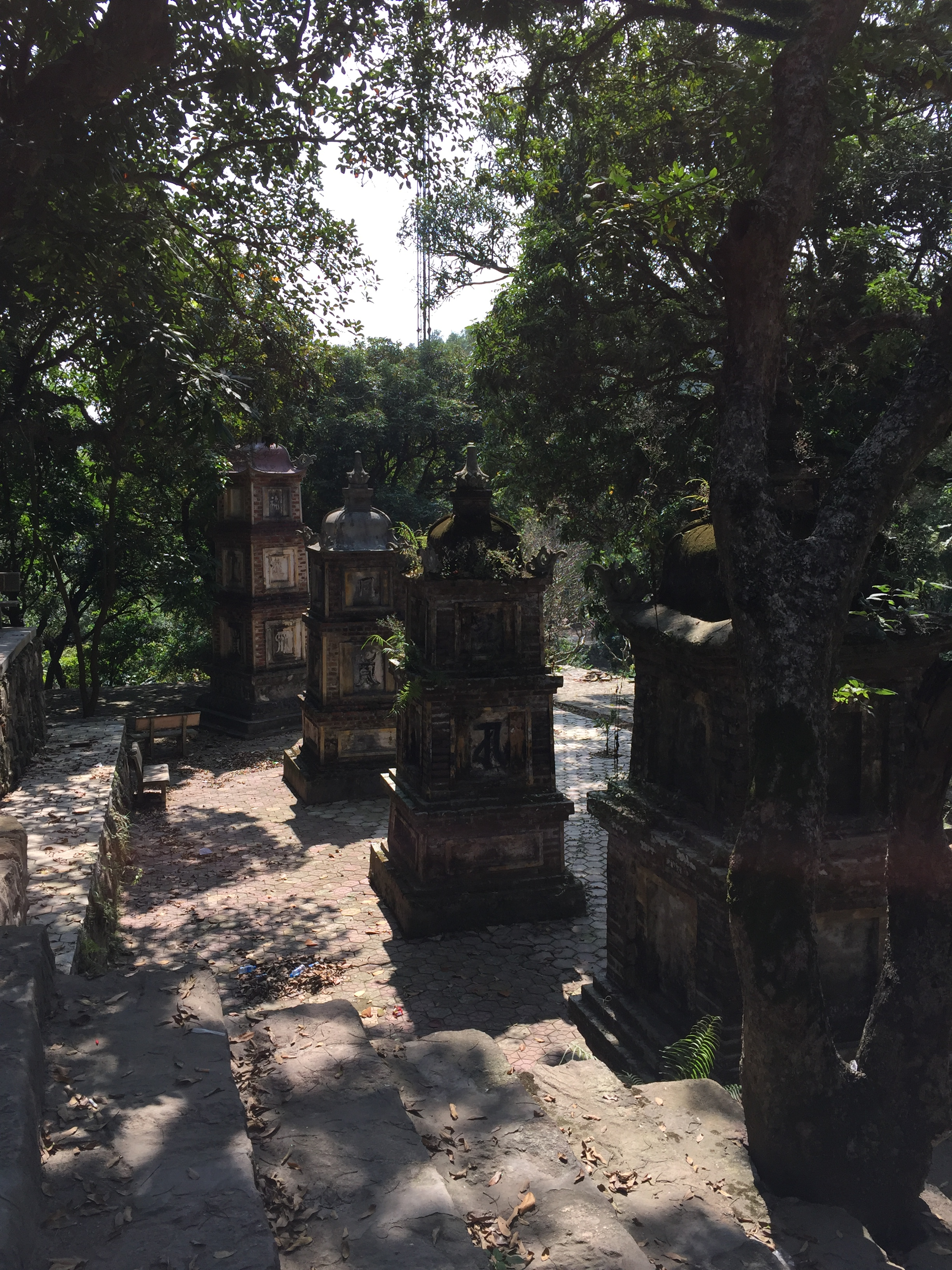 Khu vườn tháp chùa Hàm Long ở Nam Sơn, Bắc Ninh